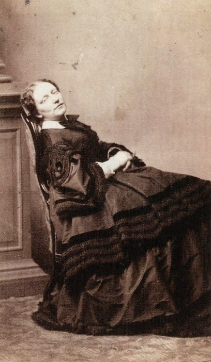 Maria Kalergis, fotografia, Muzeum Teatralne w Warszawie